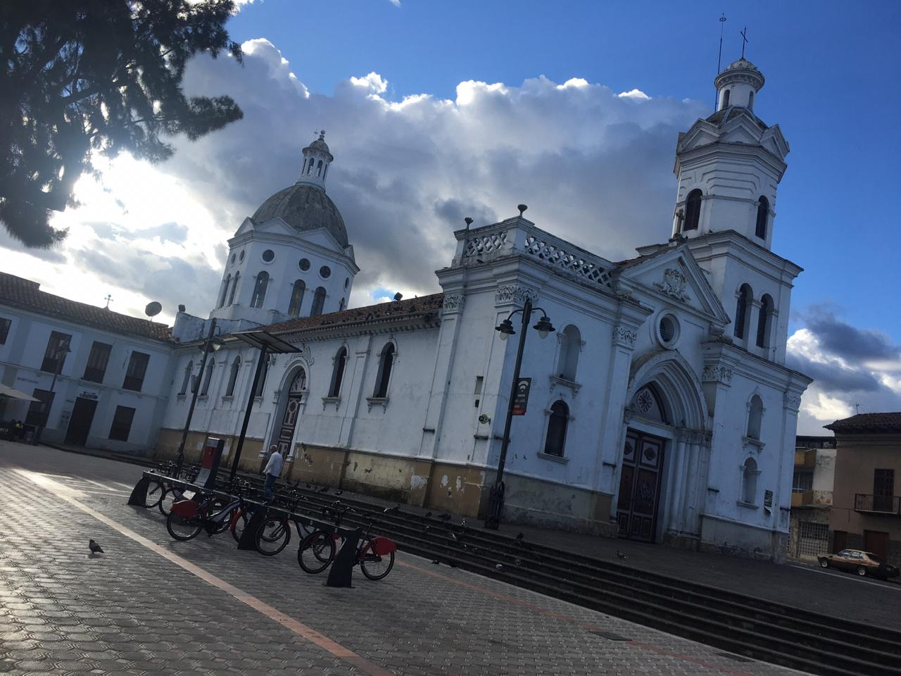 Fachada lateral y frontal de la iglesia de San Sebastian (foto tomada desde el parque San Sebastian)